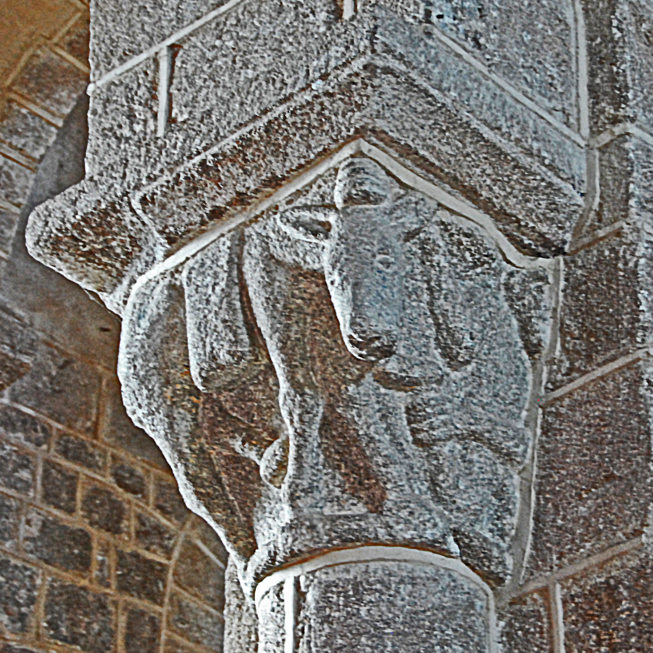 N.-D. de Châtel-Montagne, Kapitell Langhaus, Packesel